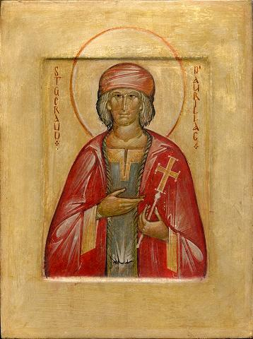 Comte Geraud d'Aurillac